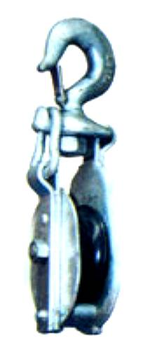 Pasteca abierta de hierro